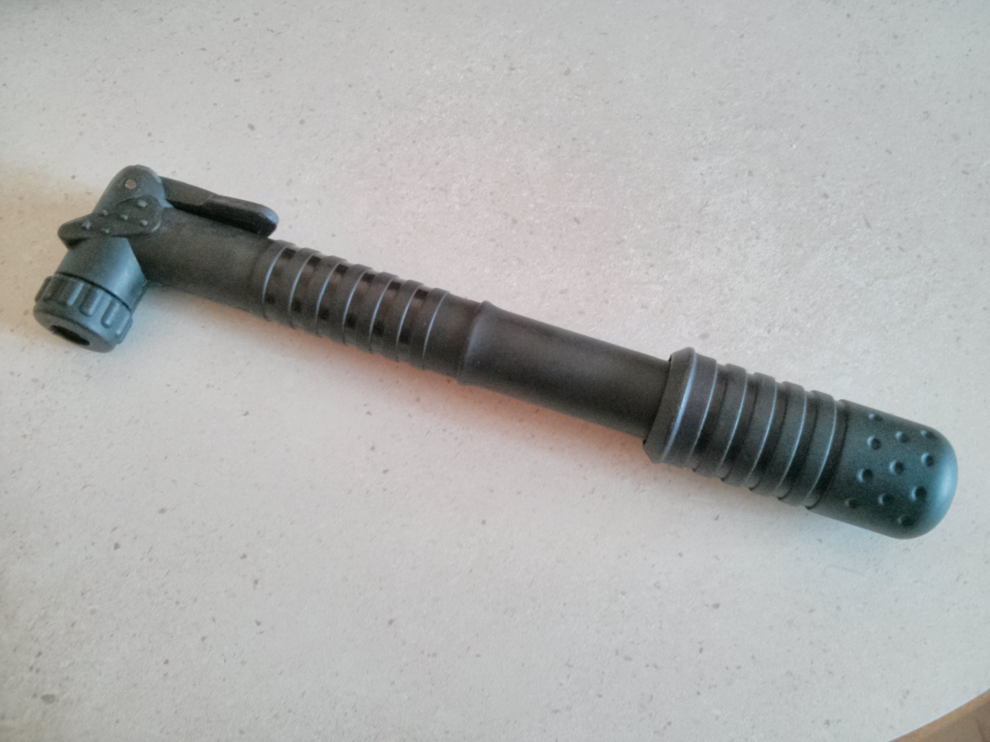 pompe à vélo